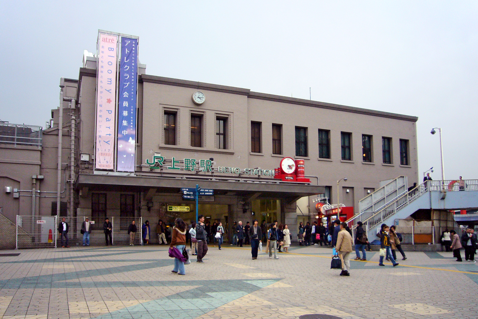 Ueno station in Taito-ku, Tokyo, Japan